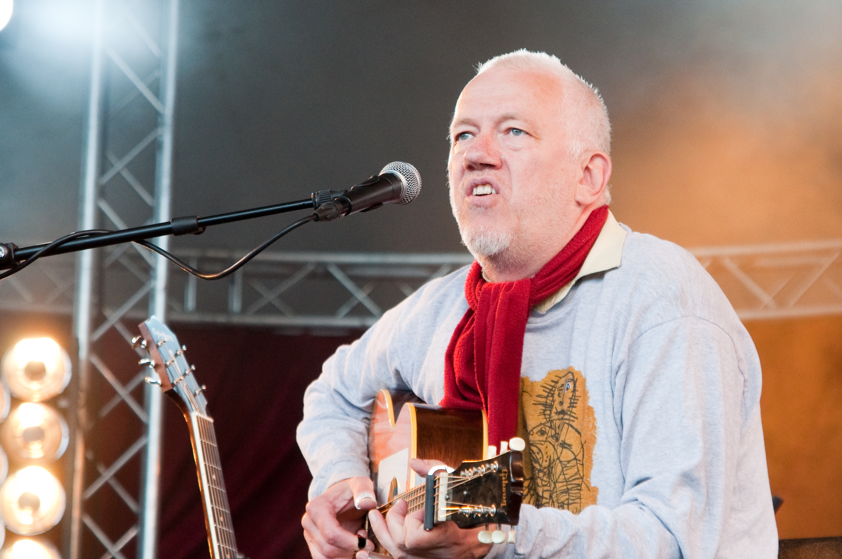 Ad van Meurs op gitaar. Into The Great Wide Open op Vlieland van 4 tot en met 6 september 2009.